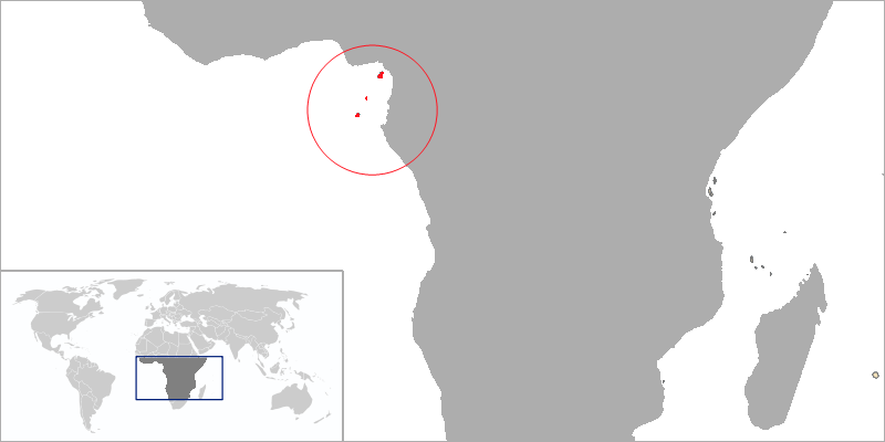 Gobernación de Fernando Poo, como parte del virreinato del R. de la Plata.